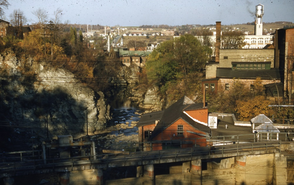 Diapositive couleur illustrant la ville de Sherbrooke dans la région administrative de l’Estrie, bordé par la rivière Saint-François.